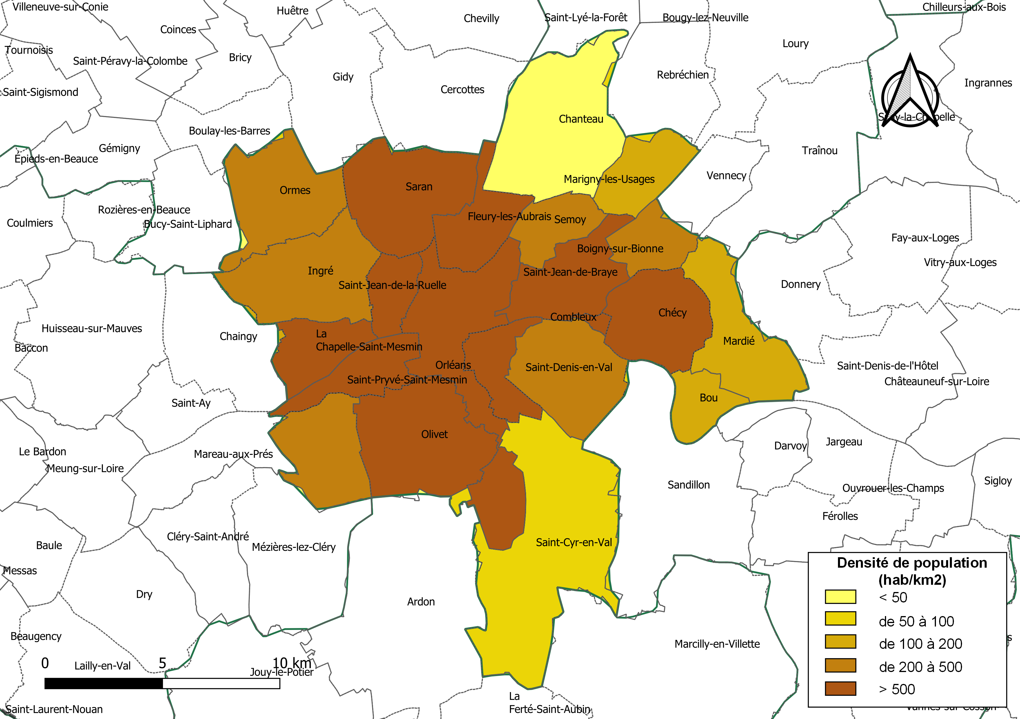 Carte des densités de population (millésimée 2016) des communes de la communauté de communes l'intercommunalité Orléans Métropole, département du Loiret, France. Composition au 1er janvier 2019.